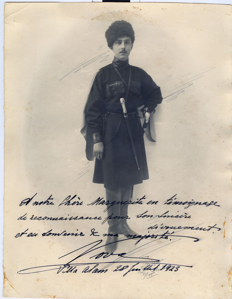 Фотография графа В.А.Красинского. Западная Европа, 1923 г. Неизвестное фотоателье. Размеры 267×208 мм. Сохранность очень хорошая. Внизу фотографии надпись чернилами в шесть строк — автограф: «A notre Chere Marguerite en temoignage / de reconnaissance pour son sencire / divonement / et en souvenir de ma majorite. / Vova / Villa Alam 28 Juillet 1923» (Нашей дорогой Маргарите в знак признательности за ее искренность и на память от большинства моих. Вова. Вилла Алам, 28 июля 1923 г.). Редкая.